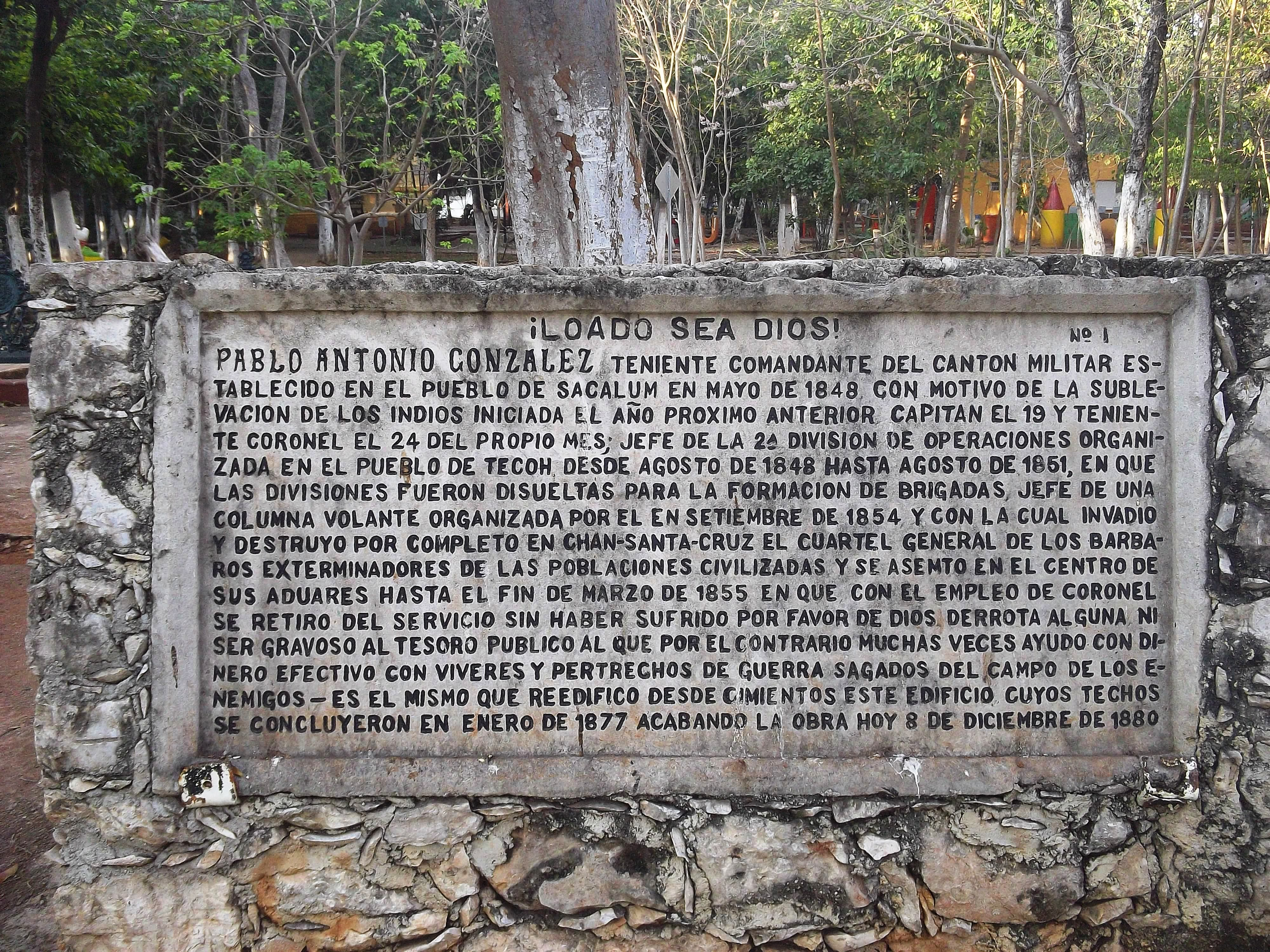 Parque Zoológico del Centenario en Mérida, Yucatán.